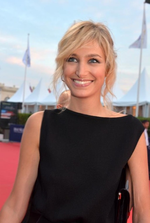 Pauline Lefèvre au festival de Deauville